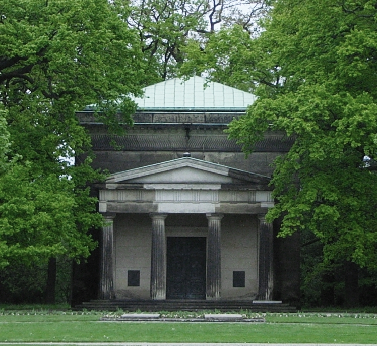 Das Welfenmausoleum mit dem Eichenhain und der Allee im Berggarten